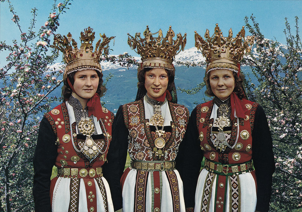 Tittel / Title: Norge: Brudedrakter fra Hardanger Motiv / Motif: Postkort. 210-29 (produksjonsnummer fra Normann) Dato / Date: ca 1971 Fotograf / Photographer: Normanns kunstforlag A/S Utgiver / Publisher: Normanns kunstforlag A/S Sted / Place: Hordaland, Hardanger Eier / Owner Institution: Nasjonalbiblioteket / National Library of Norway Lenke / Link: Bildesignatur / Image Number: blds_04024